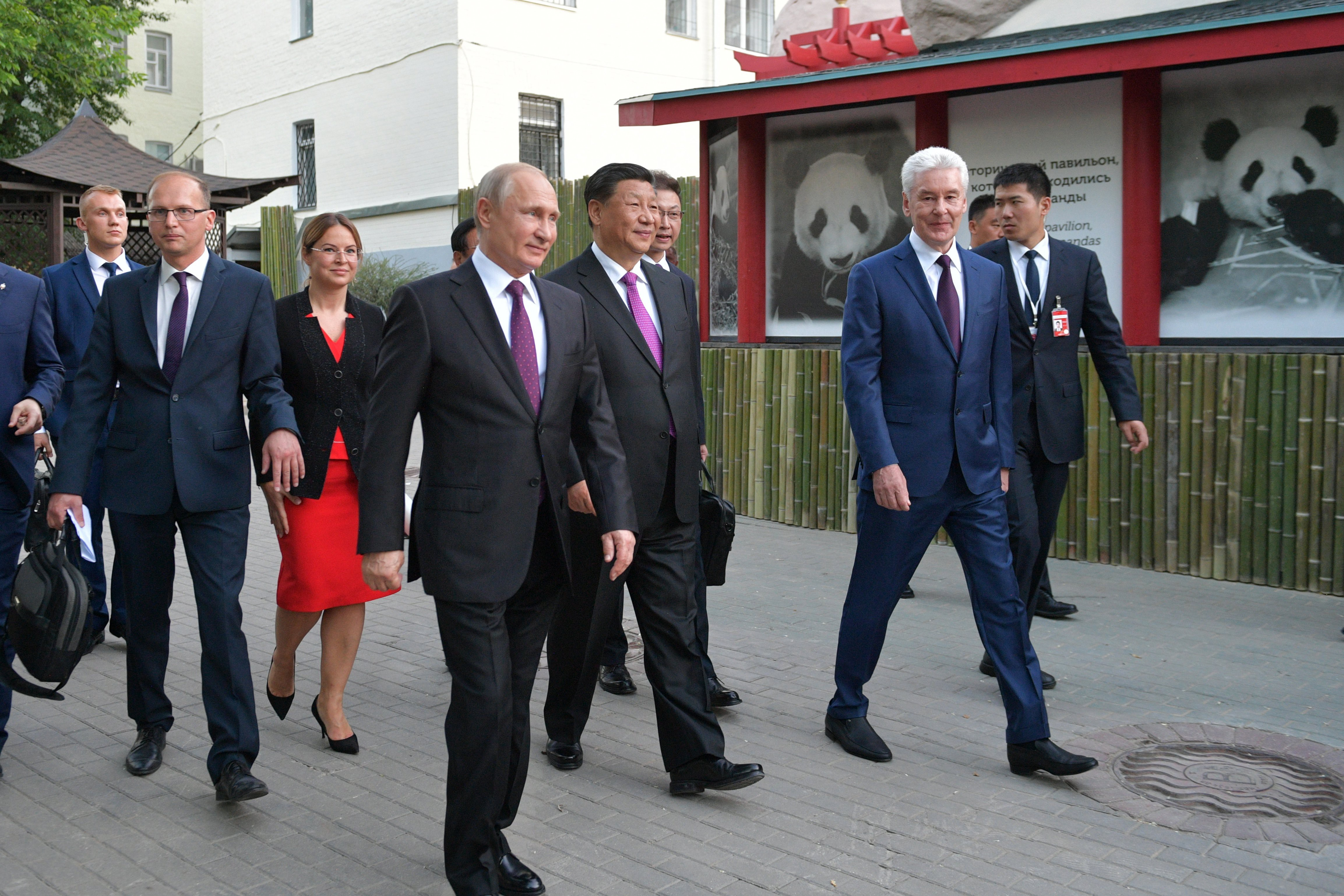 Президент России Владимир Путин с Председателем Китайской Народной Республики Си Цзиньпином и мэром Москвы Сергеем Собяниным (справа) во время посещения Московского зоопарка.